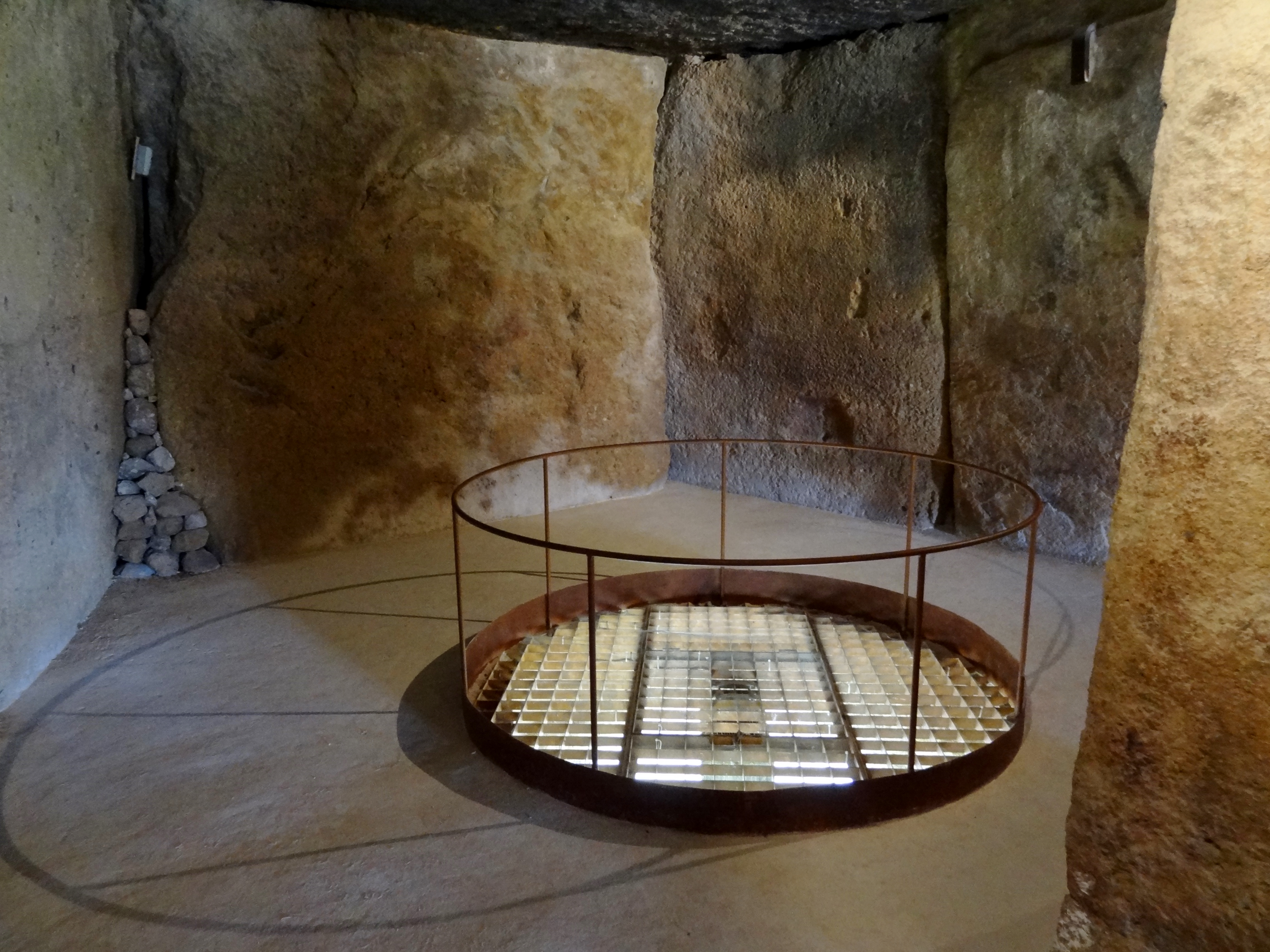 Dolmen de Menga in Antequera, Provinz Málaga, Spanien